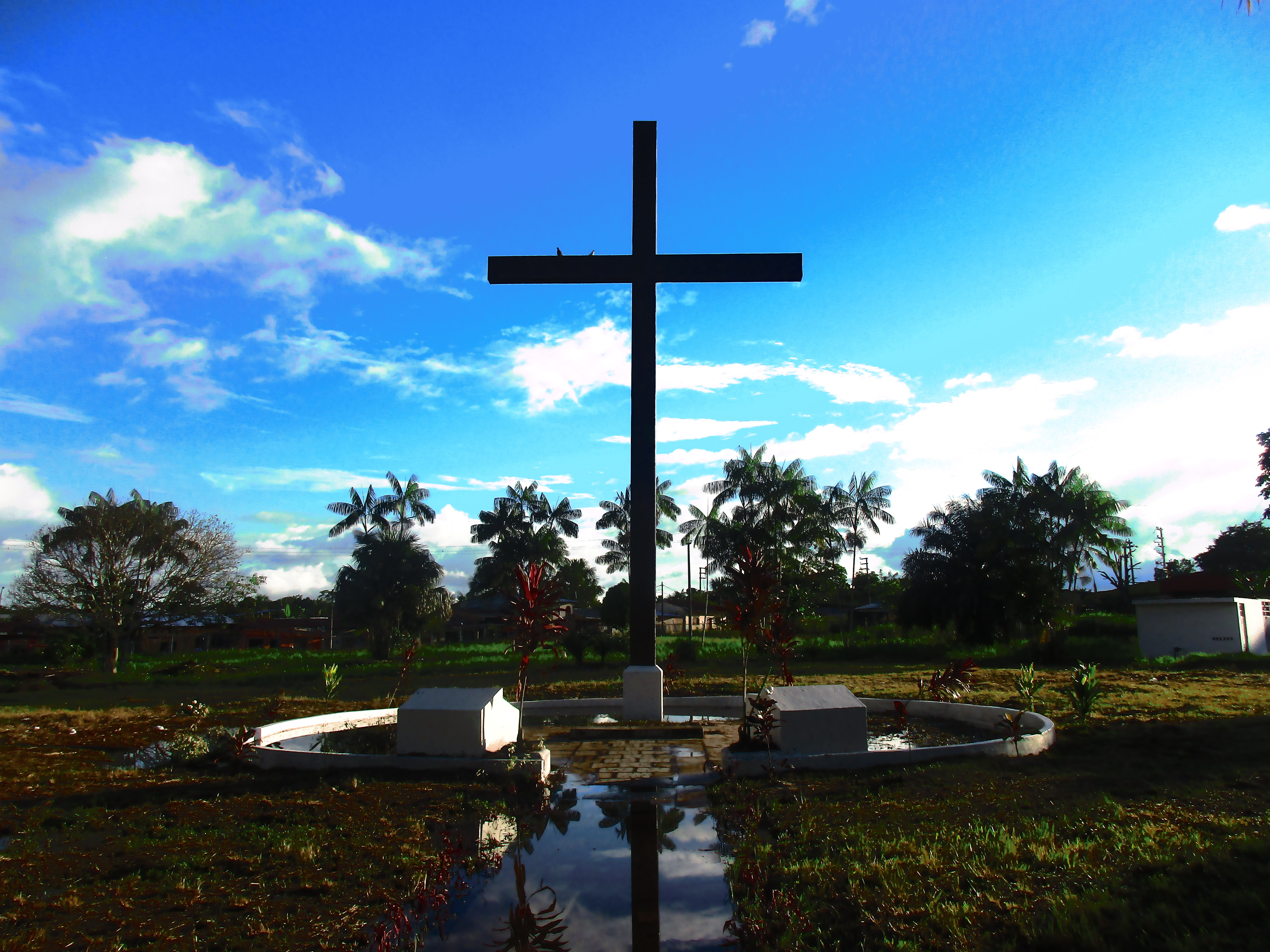 Cruz en el Aeropuerto de Iquitos en el lugar donde el papa Juan Pablo II dio su misa